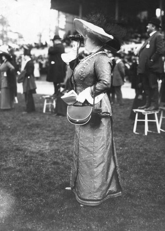 Moden von Damals! Bild 5: Mit grossem Schick gekleidet auf der Rennbahn in Berlin-Grunewald 1912